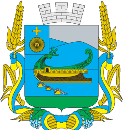 Герб Ямпільського району (Вінницька область)